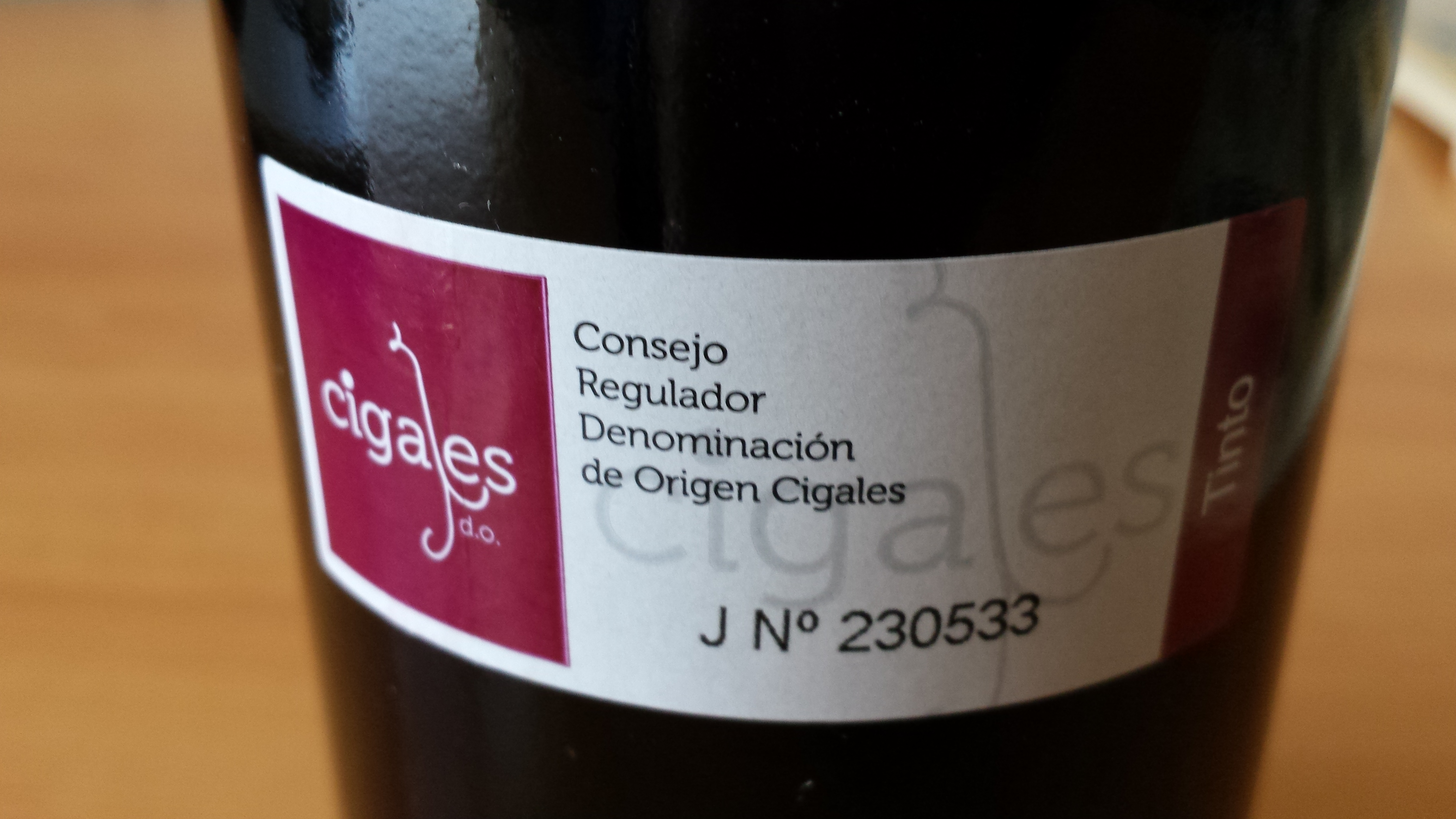 Etiqueta de vino de la DO Cigales Valladolid, España